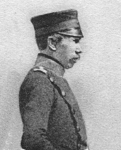 Kommandeur Ulanen-Regiment "Großherzog Friedrich von Baden" (Rheinisches) Nr. 7